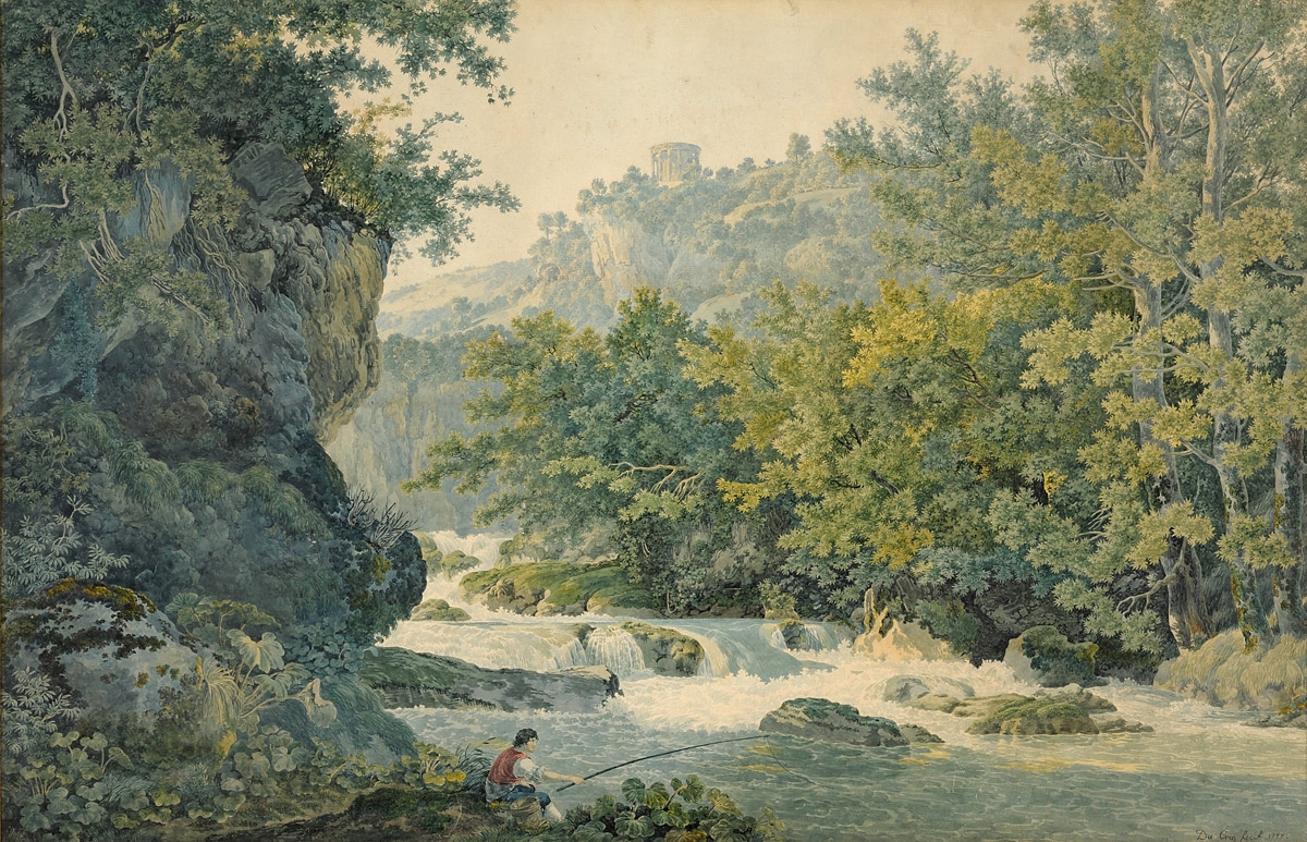 Angler bei Tivoli. Signiert. Datiert 1777. Aquarell. 66 x 100 cm